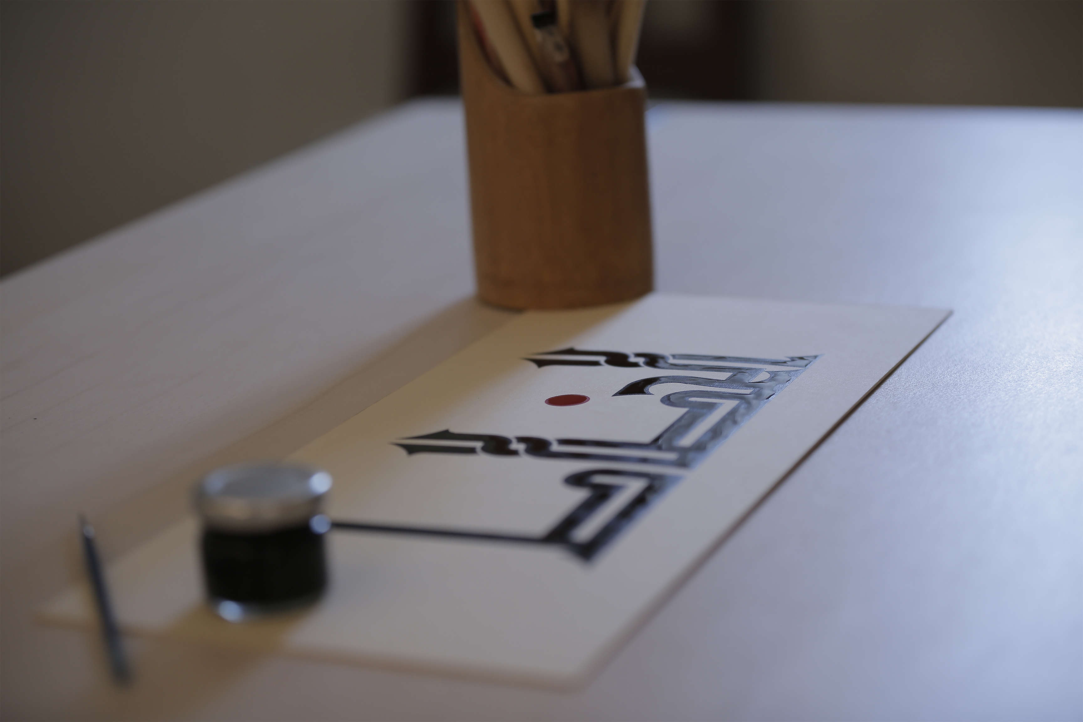 زخرفة منصة الخطاط